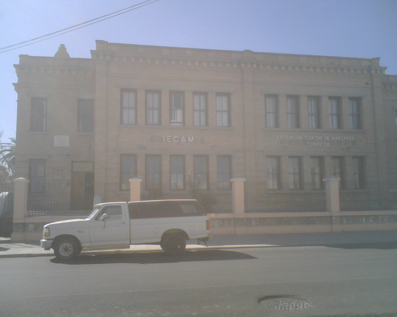 Primaria Amado Nervo